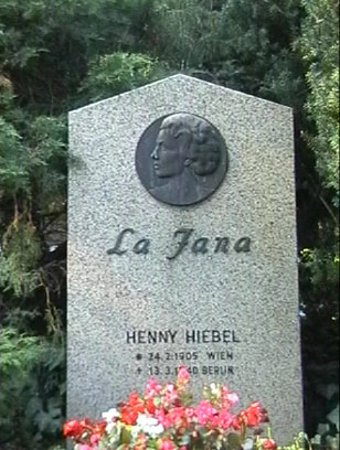 Ehrengrab La Jana (Henny Hiebel, 1905–1940) auf dem Waldfriedhof Dahlem in Berlin